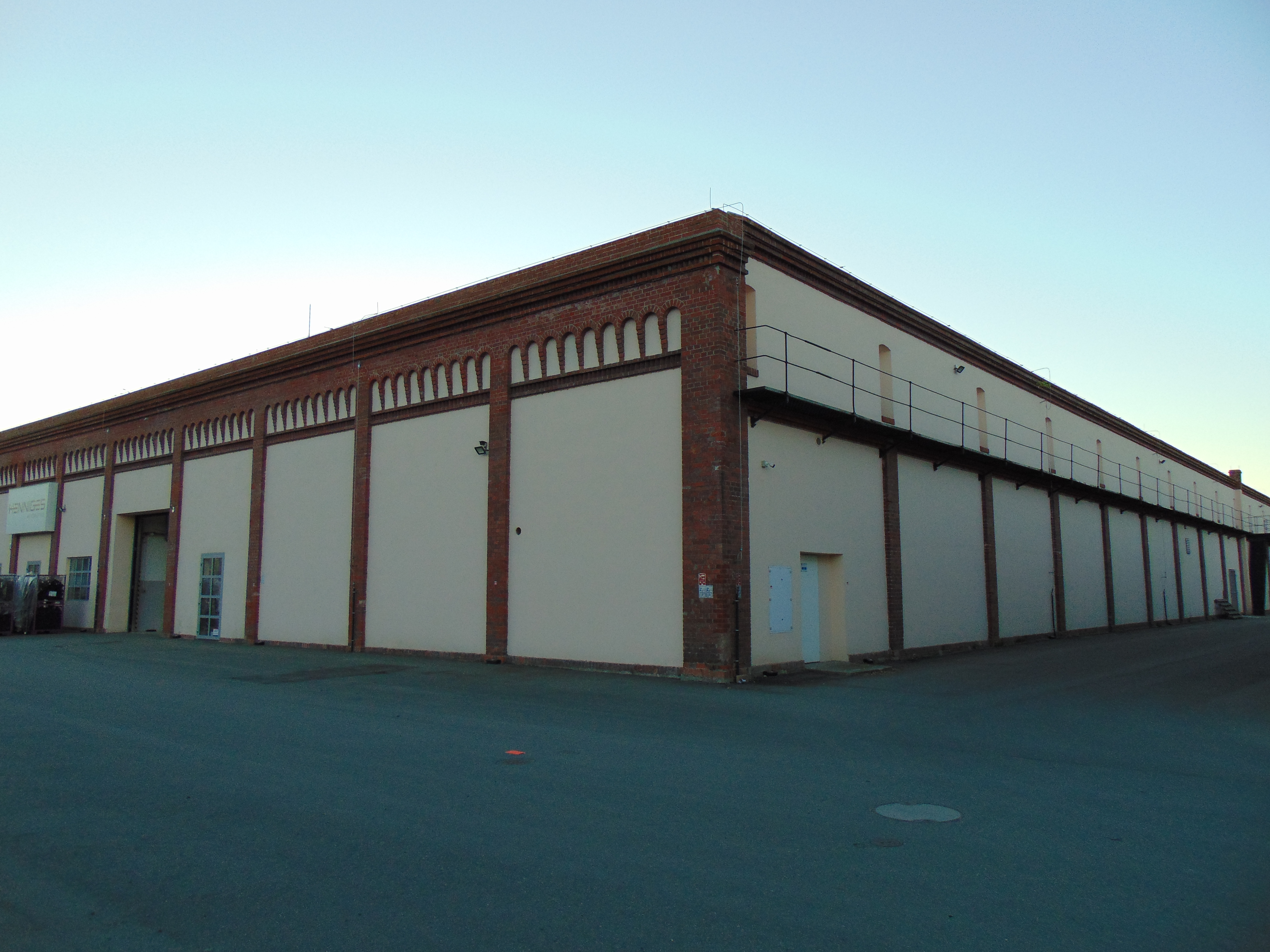 Obiekty postindustrialne. Budynki fabryki tekstylnej z XIX wieku, znanej po roku 1945 pod nazwą ZPB "Frotex" Prudnik.